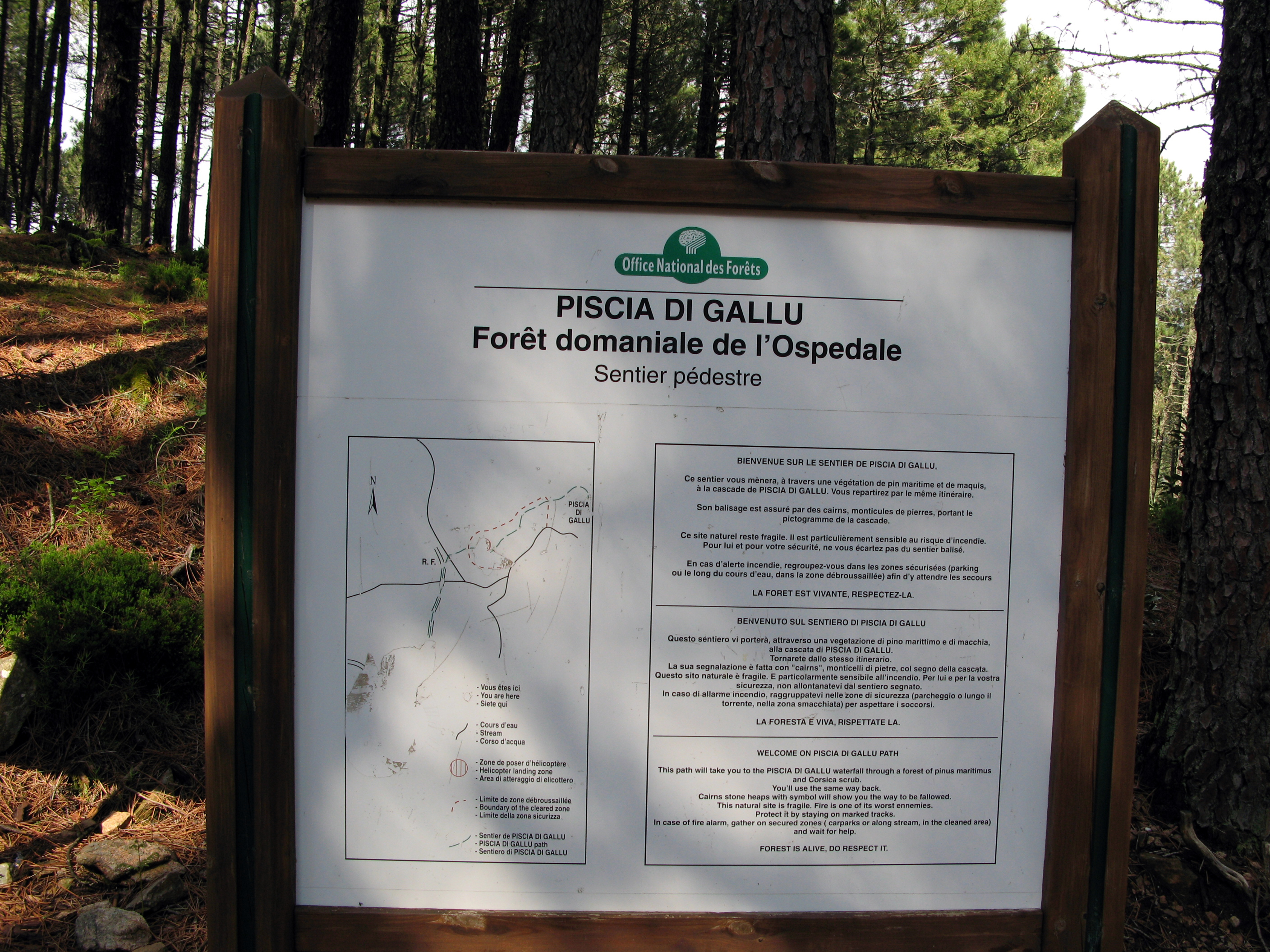 Piscia di Gallo (Corse-du-Sud, France)